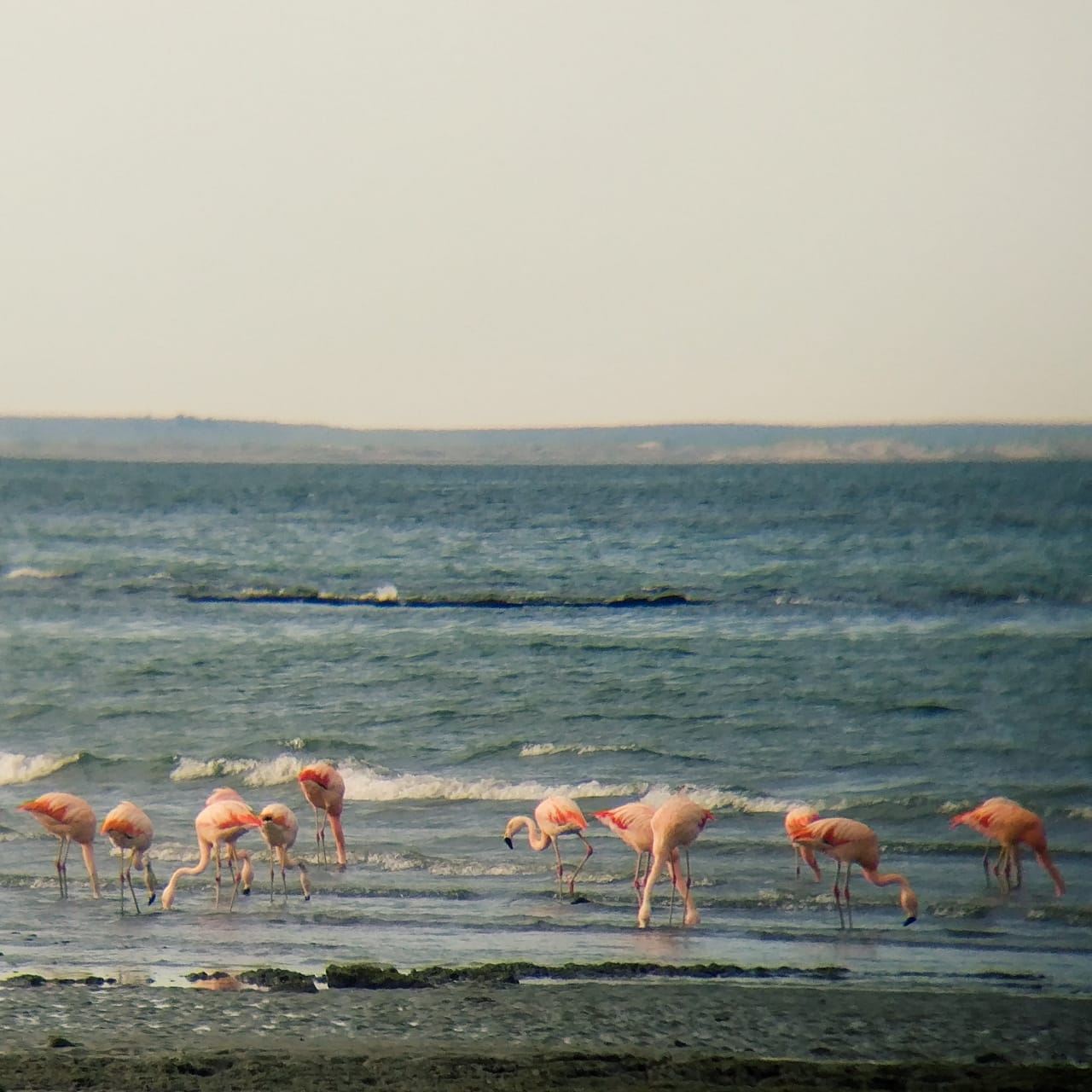 Flamencos. 2020. Piedras Coloradas, Las Grutas, Argentina